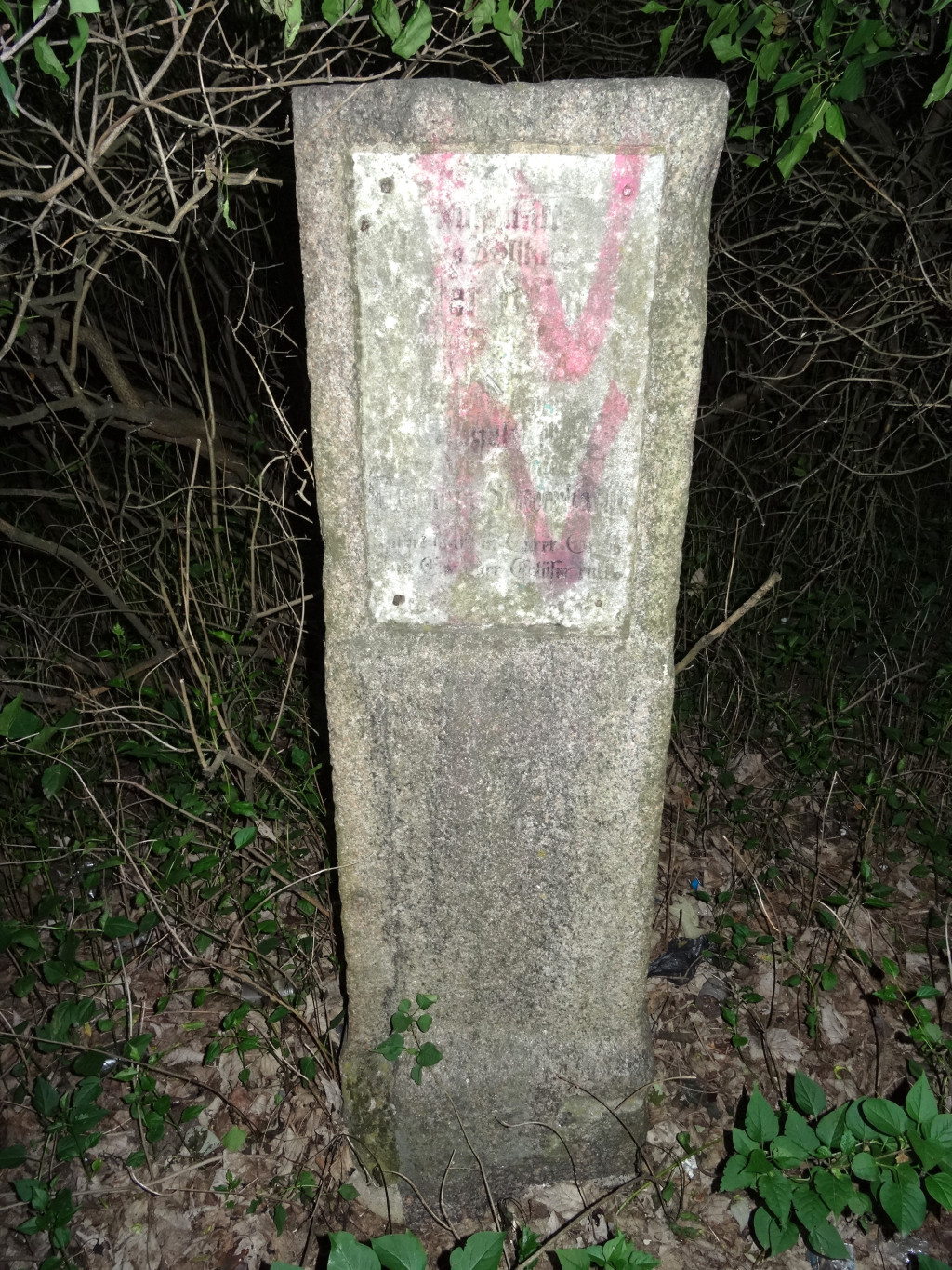 Opuszczony cmentarz poewangelicki na Glinkach w Bydgoszczy (ul. Cmentarna)